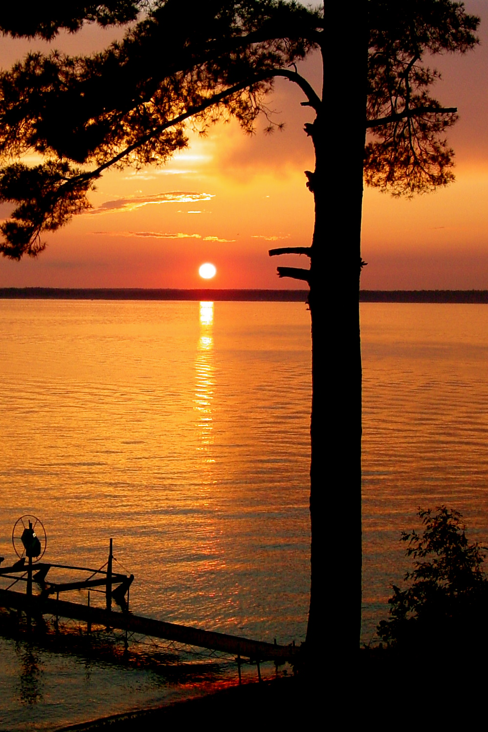 Gull Lake sunset, July 2008